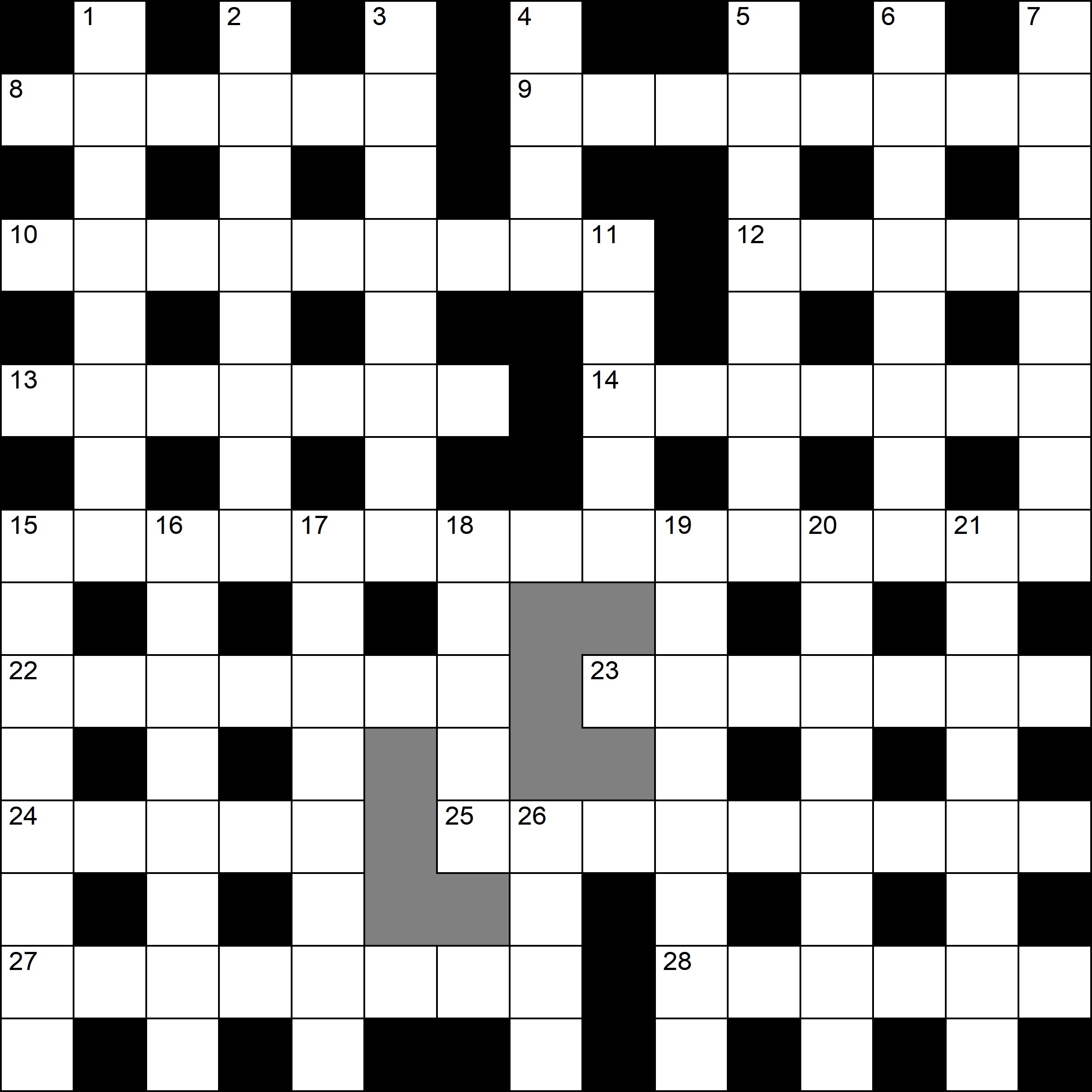 Diagram van een cryptogram